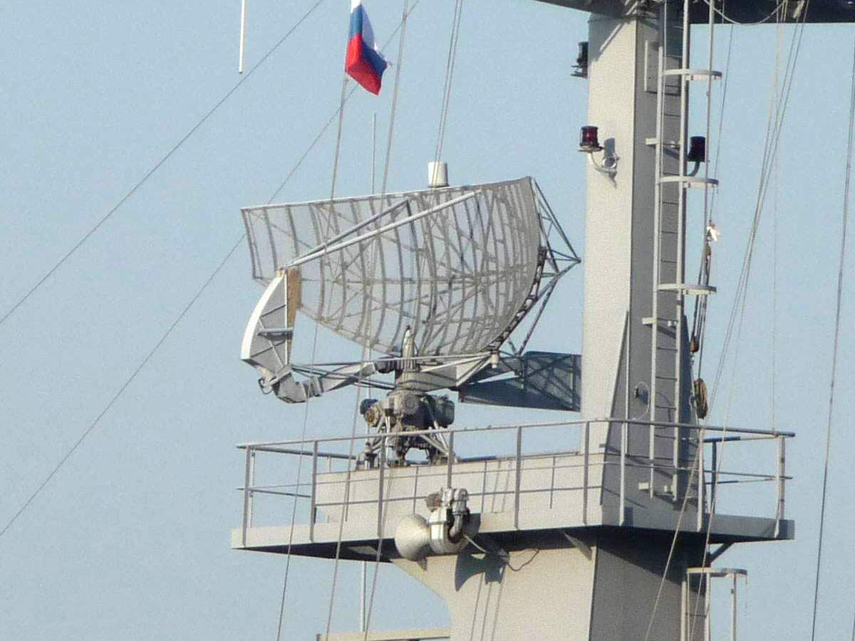 Радар DRBV-21A на французском фрегате «Вендемьер». Снято во время визита корабля во Владивосток, 2013-05-07.